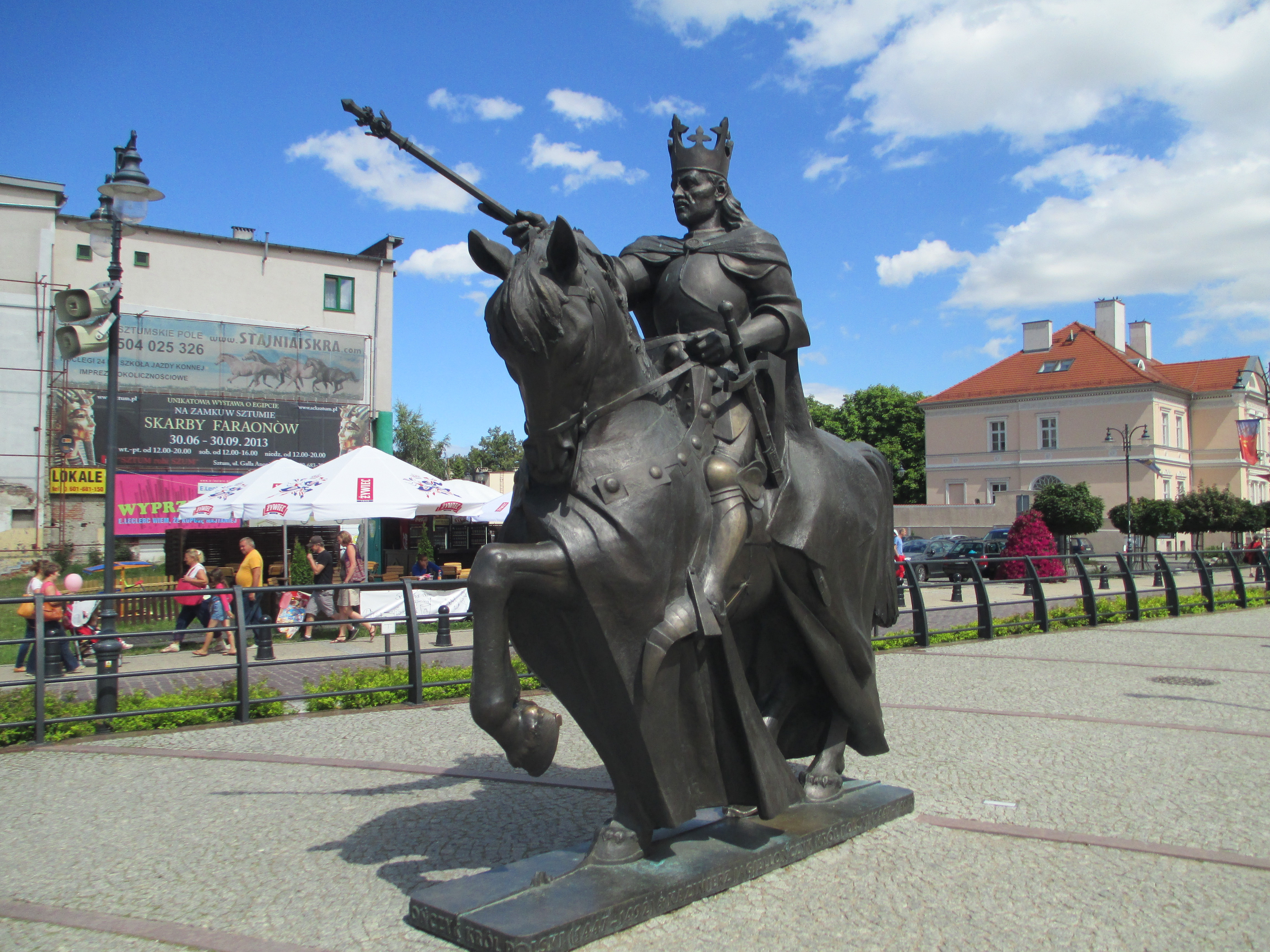 פסל של קז'ימייז' הרביעי מלך פולין במלבורק